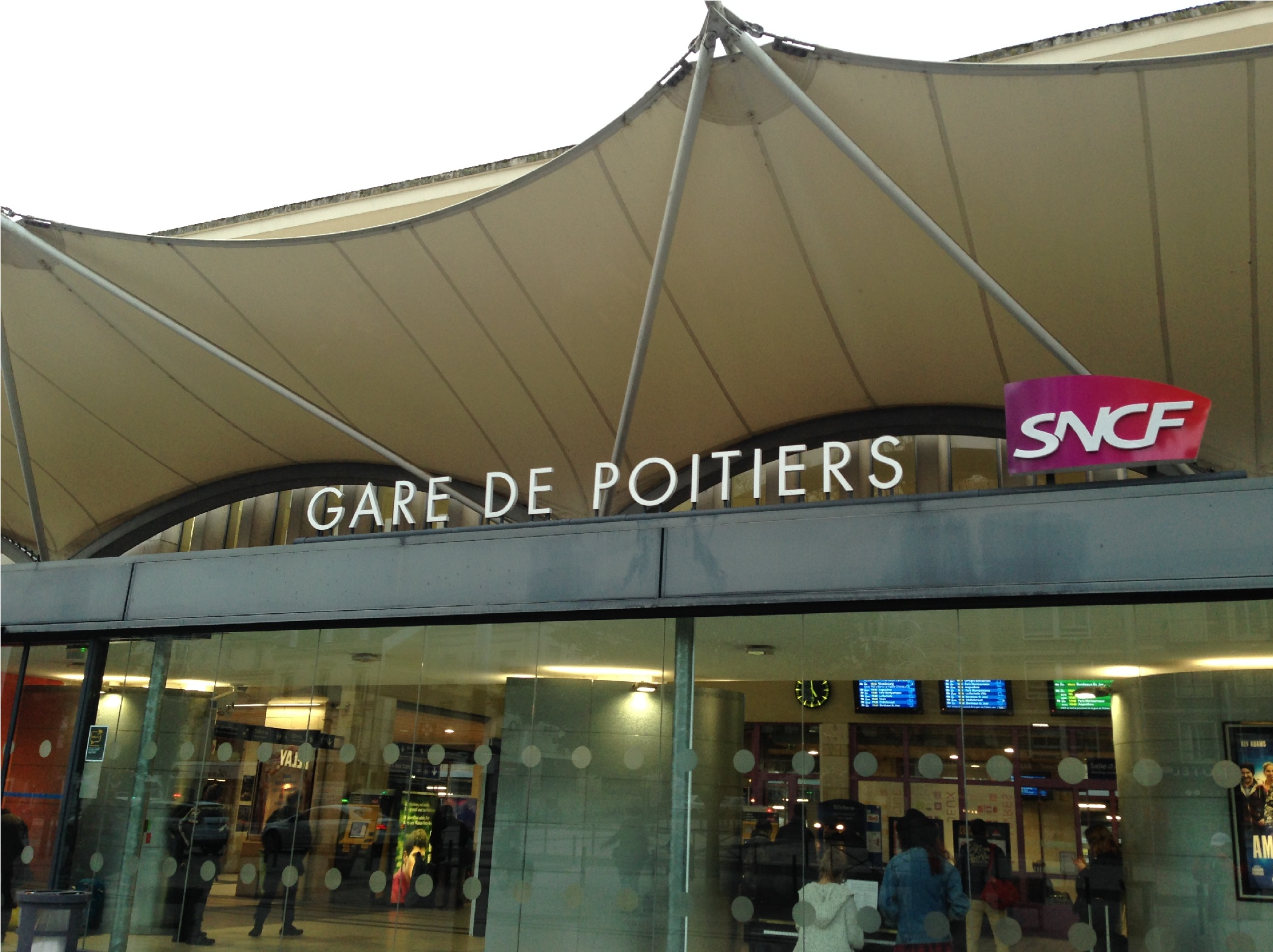 普瓦捷站（Gare de Poitiers）